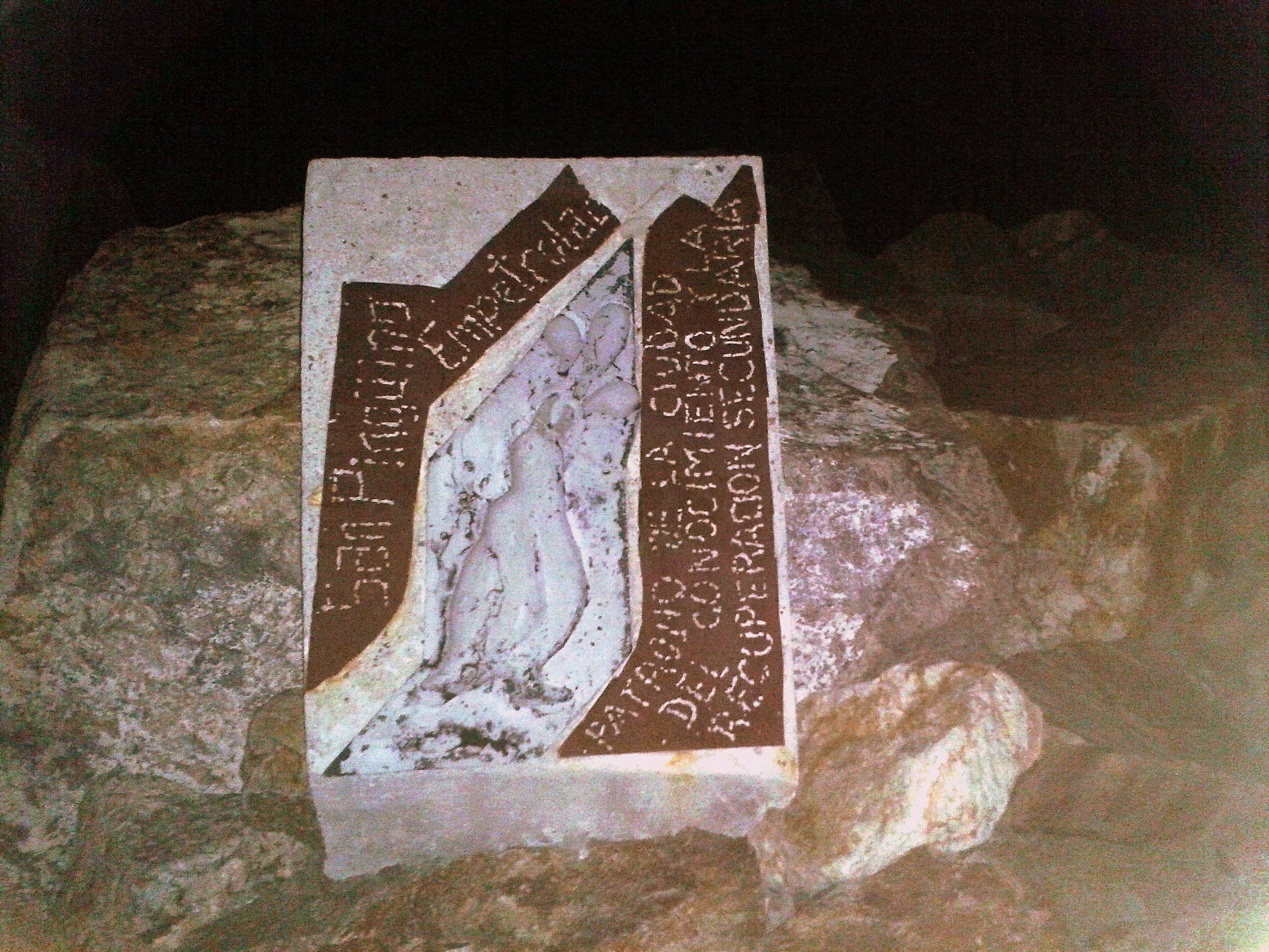 Monumento al derrame de petroleo de 2008